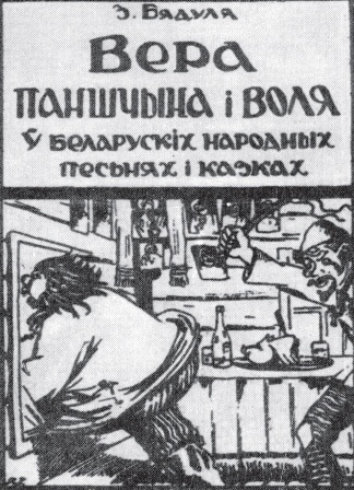 Павел Гуткоўскі. Вокладка кнігі Вера, паншчына і воля ў беларускіх народных песнях і казках. 1924